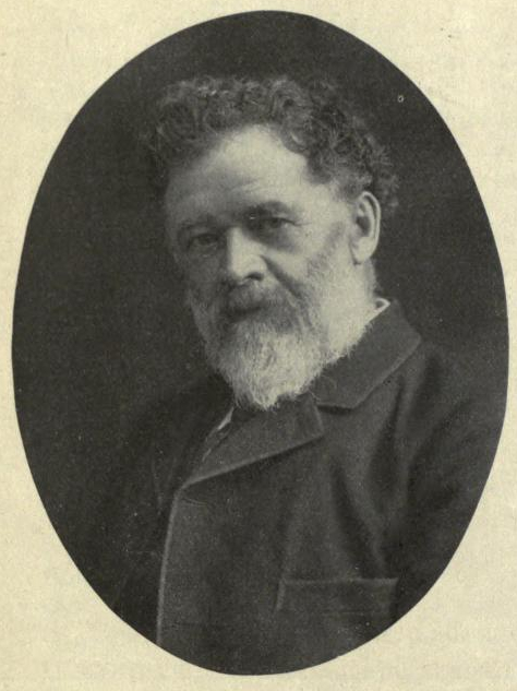 John Fannin (1837-1904)